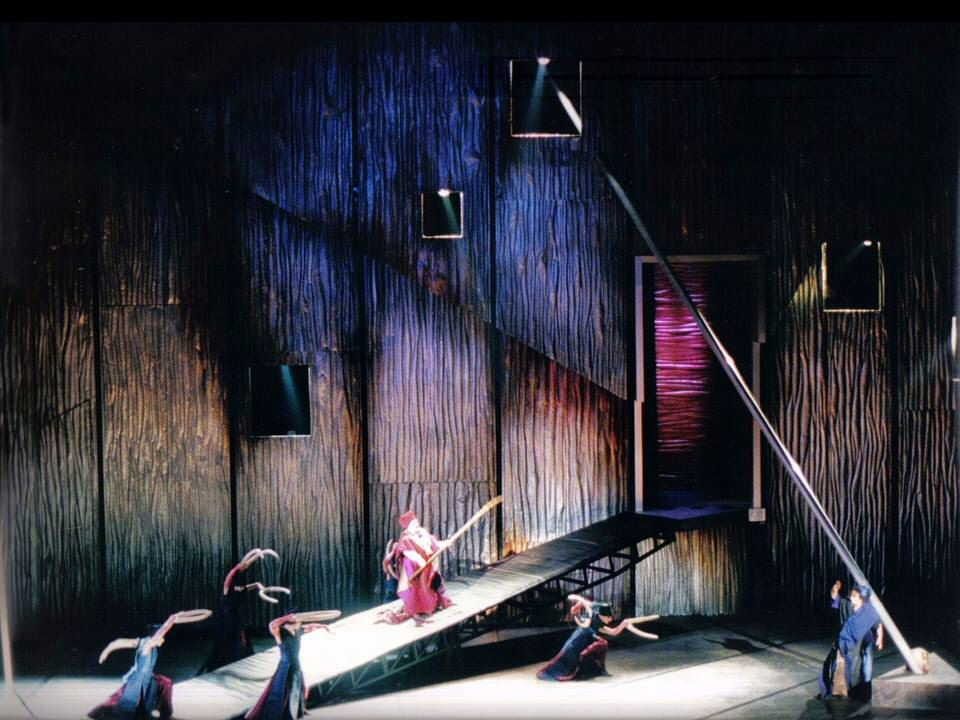 אלקטרה